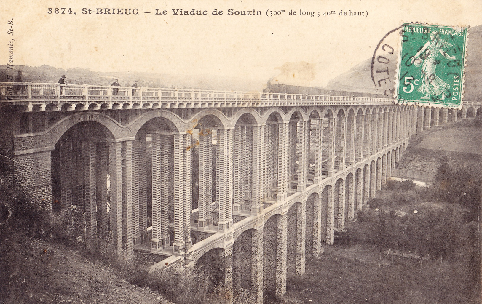 Carte postale ancienne éditée par Hamonic à Saint-Brieuc, n°3874 :St-BRIEUC - Le Viaduc de Souzin (300 m de long, 40 m de haut)